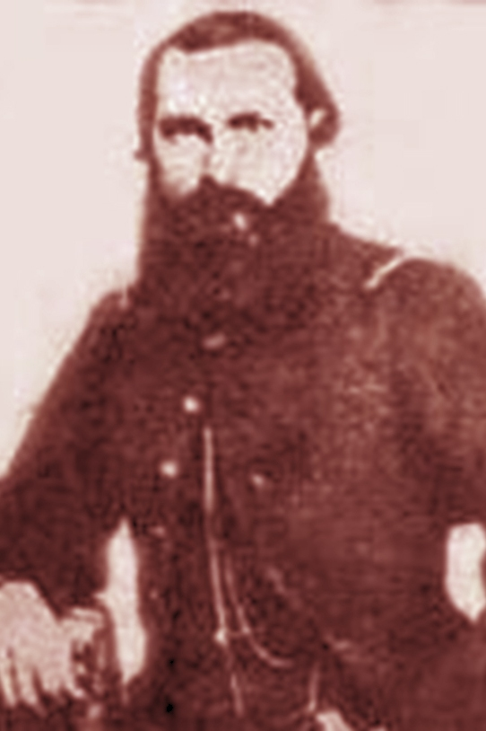 Coronel Desiderio Sosa